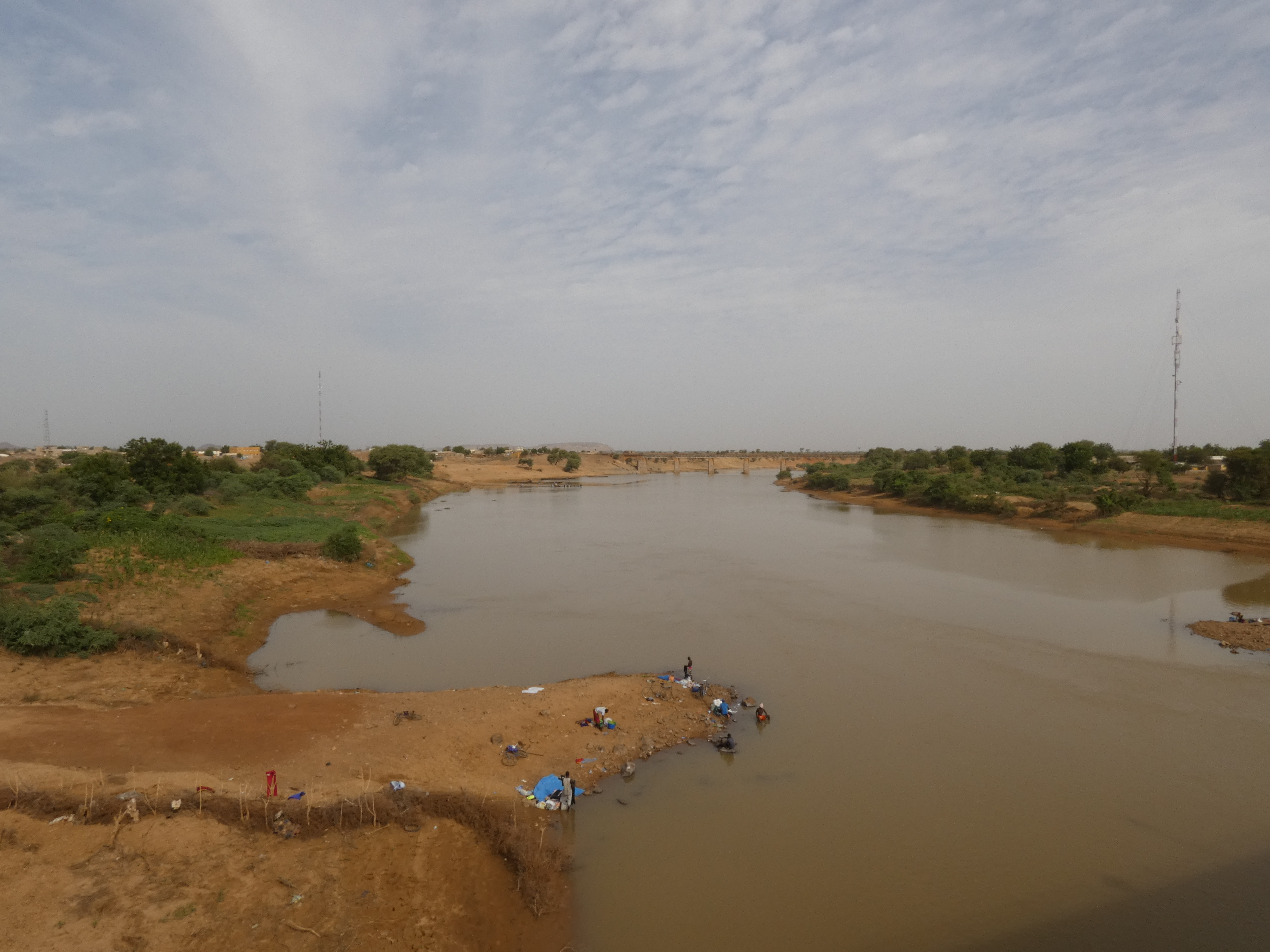 Falémé bei Kidira